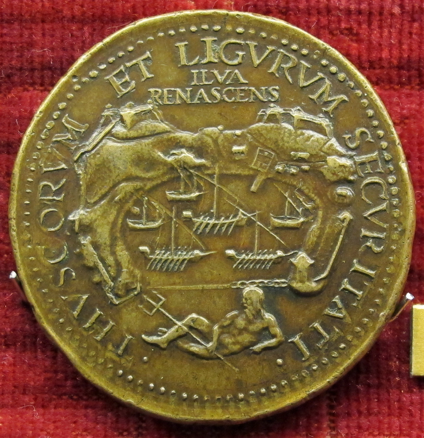 Domenico poggini, medaglia di cosimo I de' medici e fortificazioni isola d'elba, verso